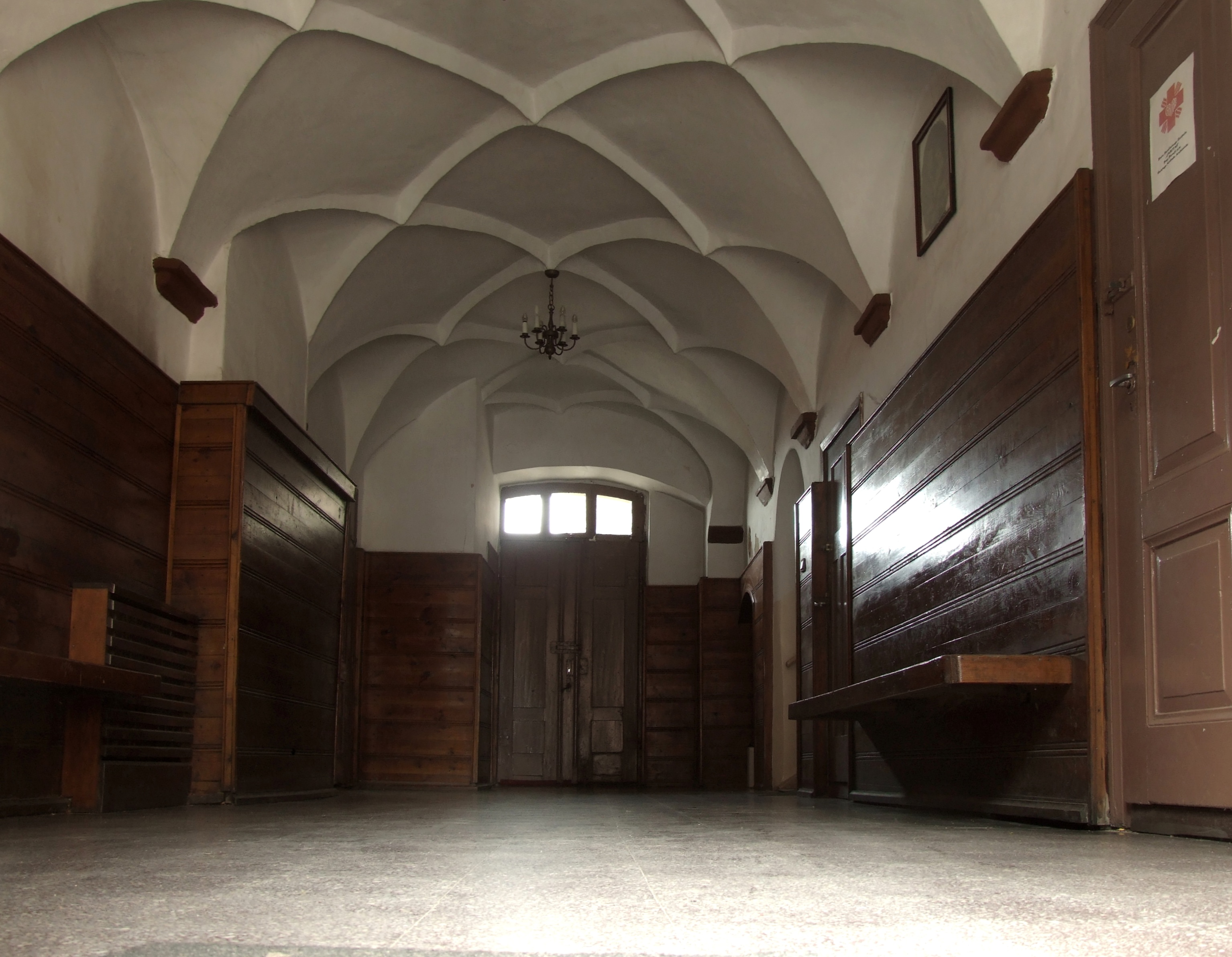 Wnętrze dawnej szkoły parafialnej w Świebodzinie Autor: Mohylek 18:07, 8 March 2007 (UTC)